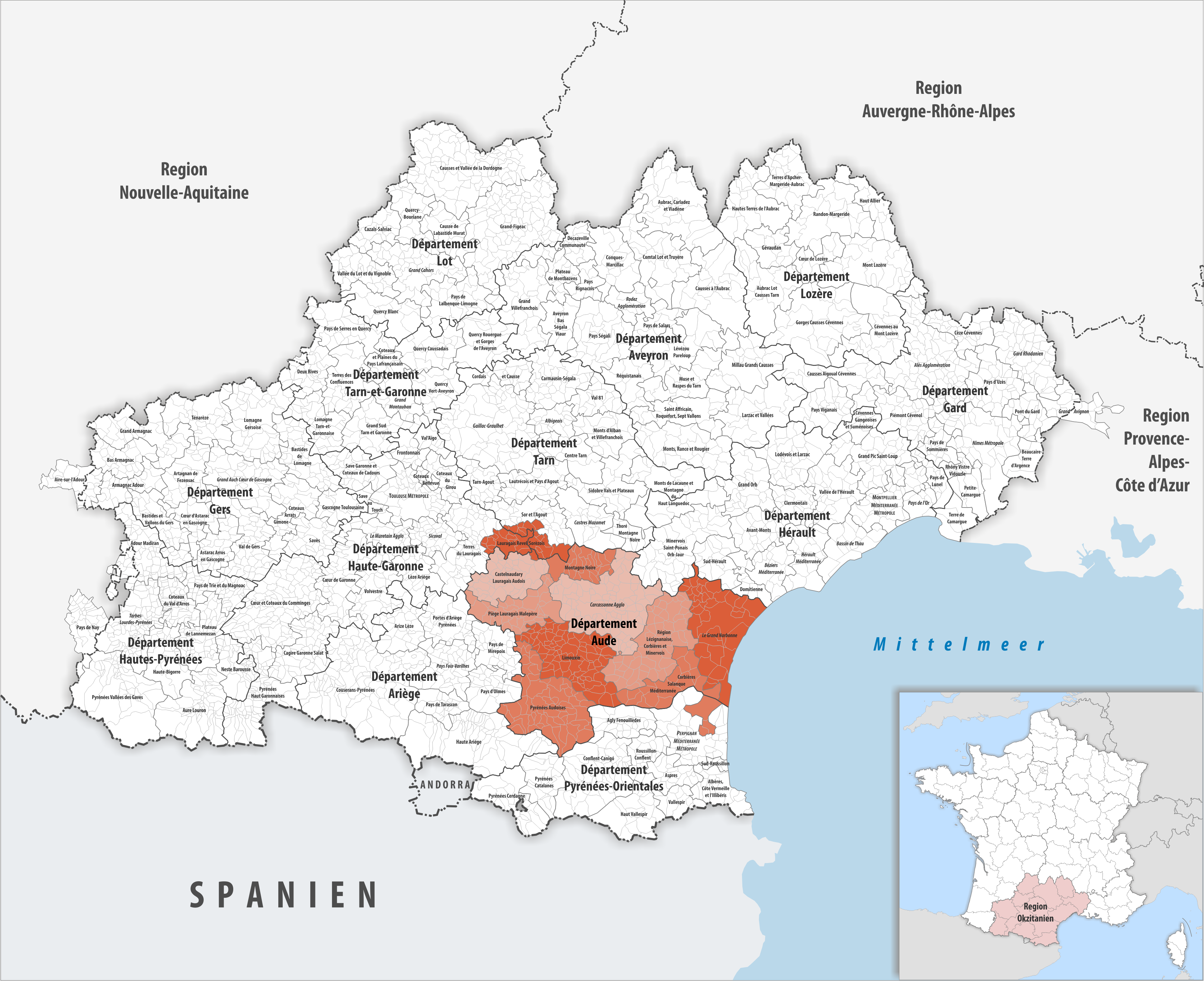 Gemeindeverbände im Département Aude